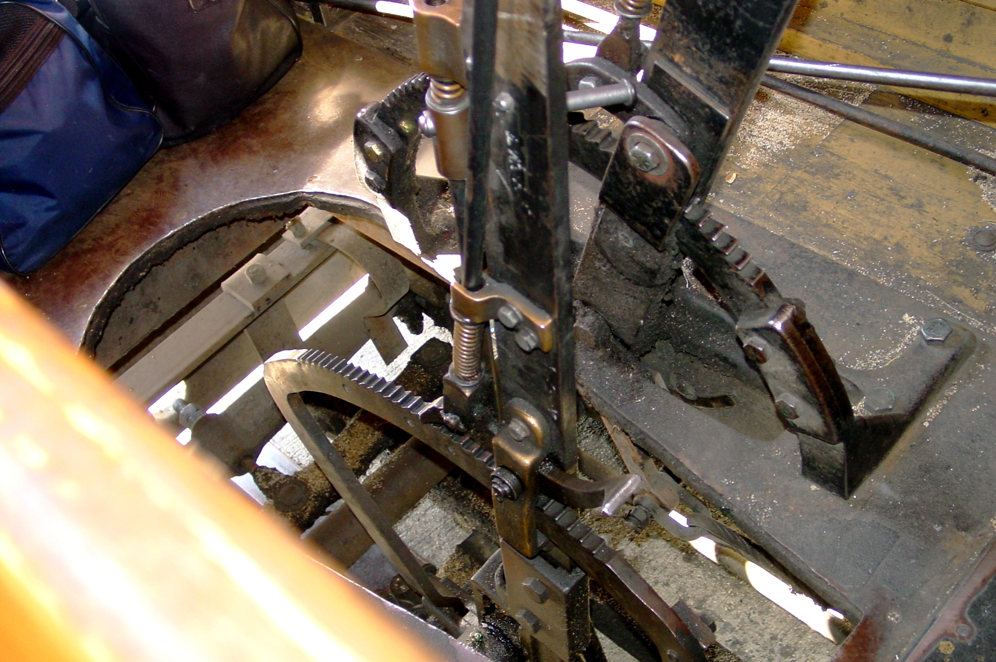 Détail du bas du levier de commande permettant au "gripman" de pincer ou lâcher le câble sur les "cable cars" de San Francisco, Californie, États Unis d'Amérique.